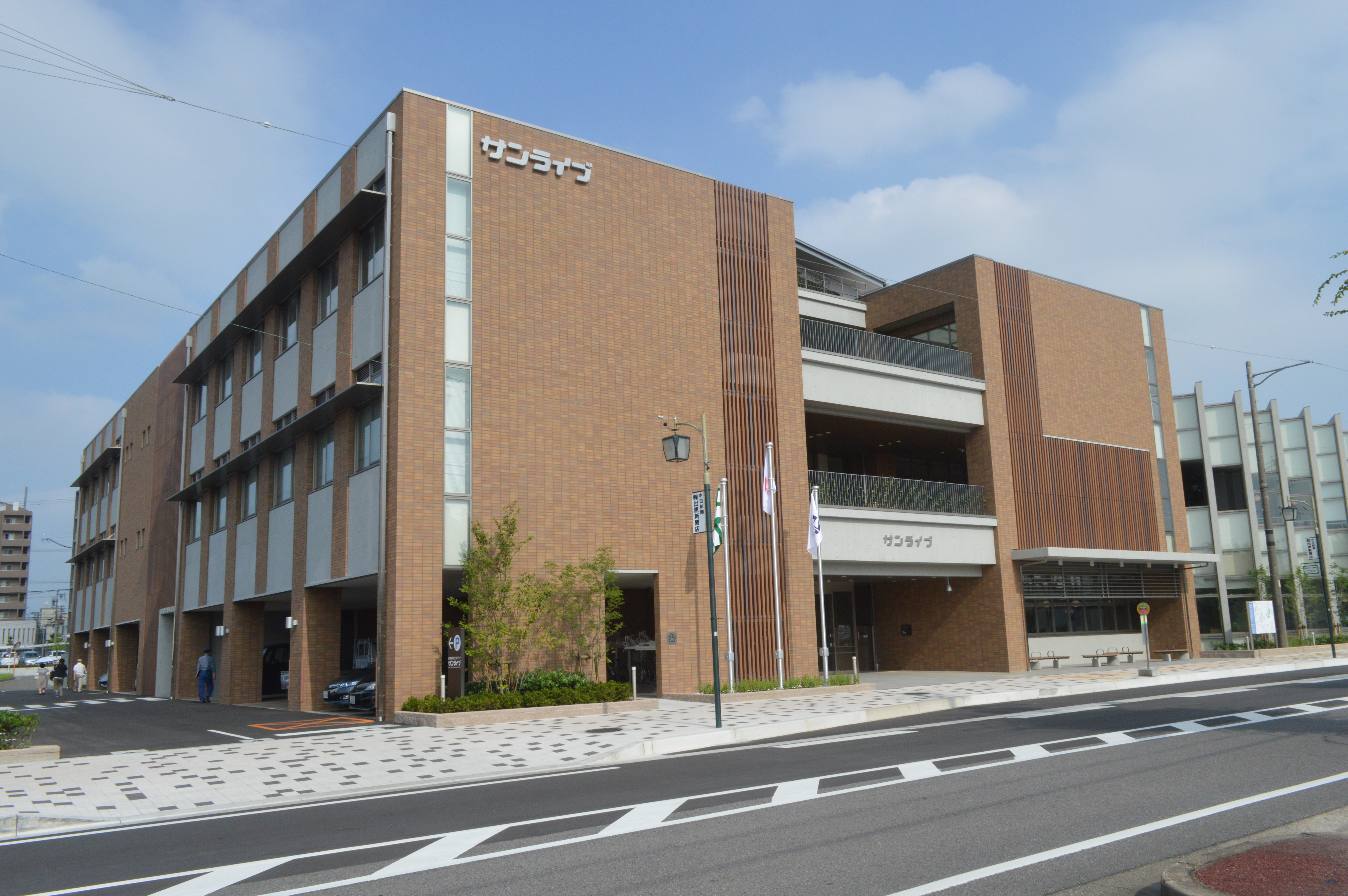 愛知県みよし市にある複合施設、みよし市図書館学習交流プラザ「サンライブ」。みよし市立中央図書館などを内包。